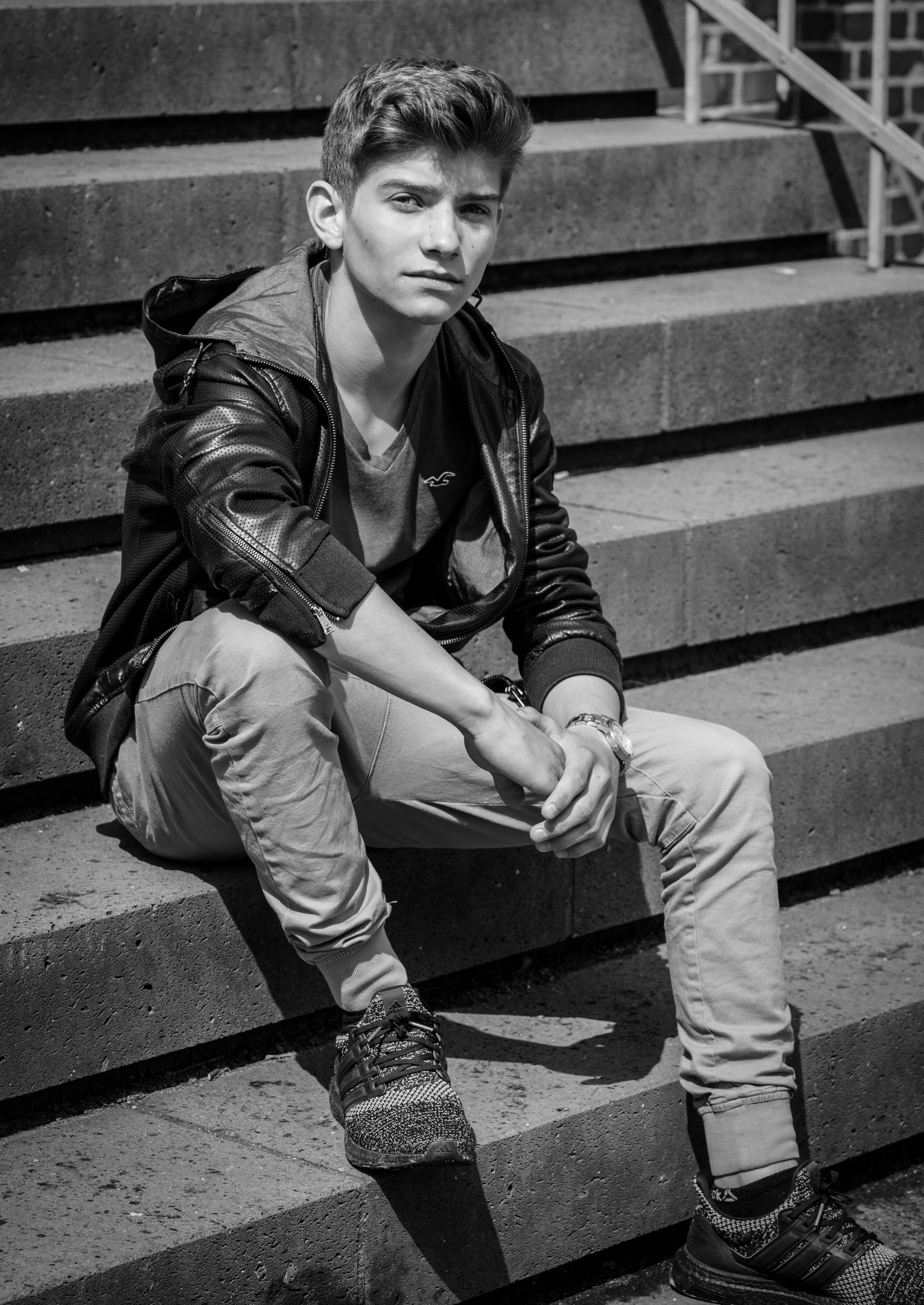 Juls Serger